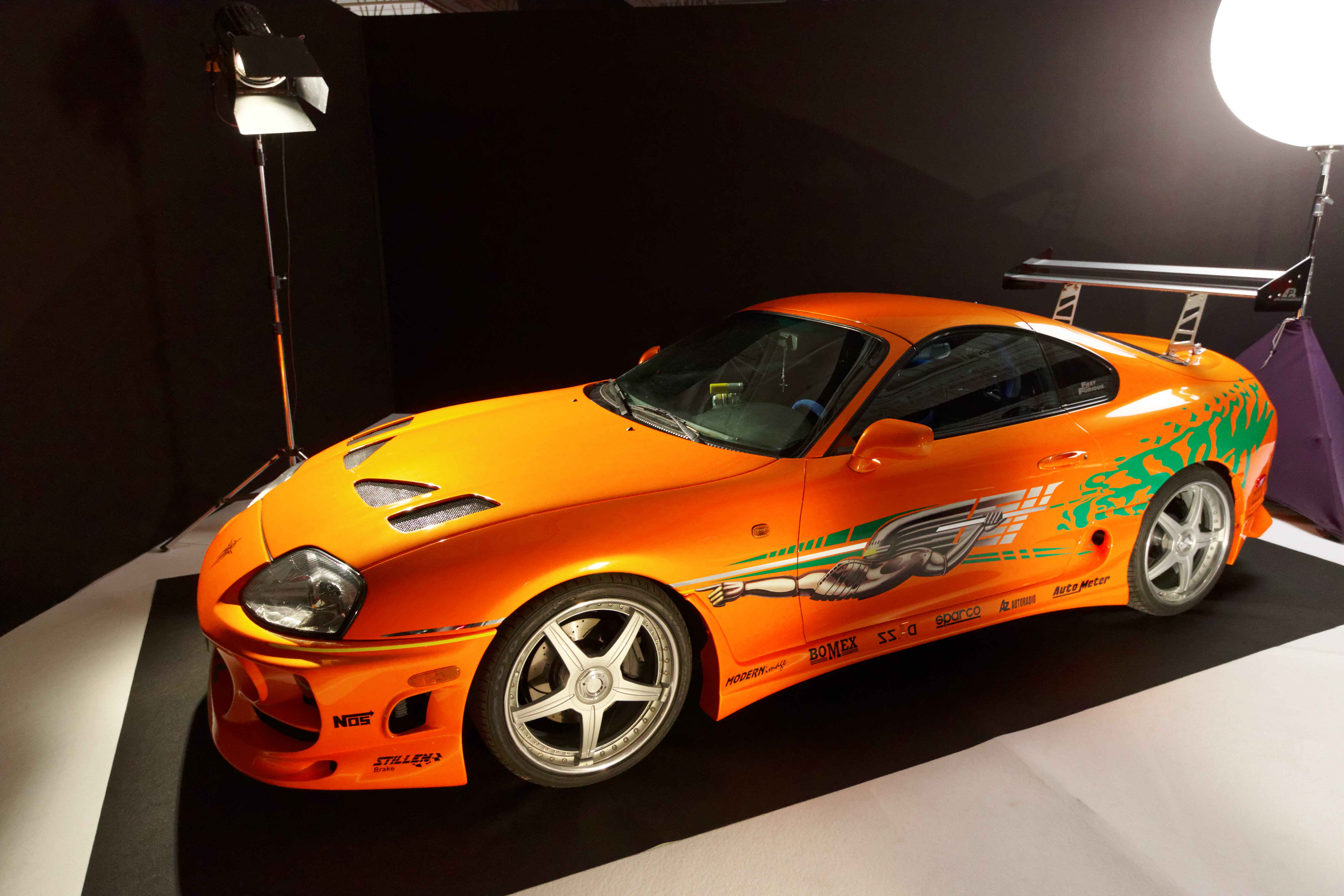 Une Toyota Supra de 1994 présentée lors du mondial de l'automobile de Paris 2016. Ce modèle de véhicule a été utilisé sur le tournage du film Fast & Furious.